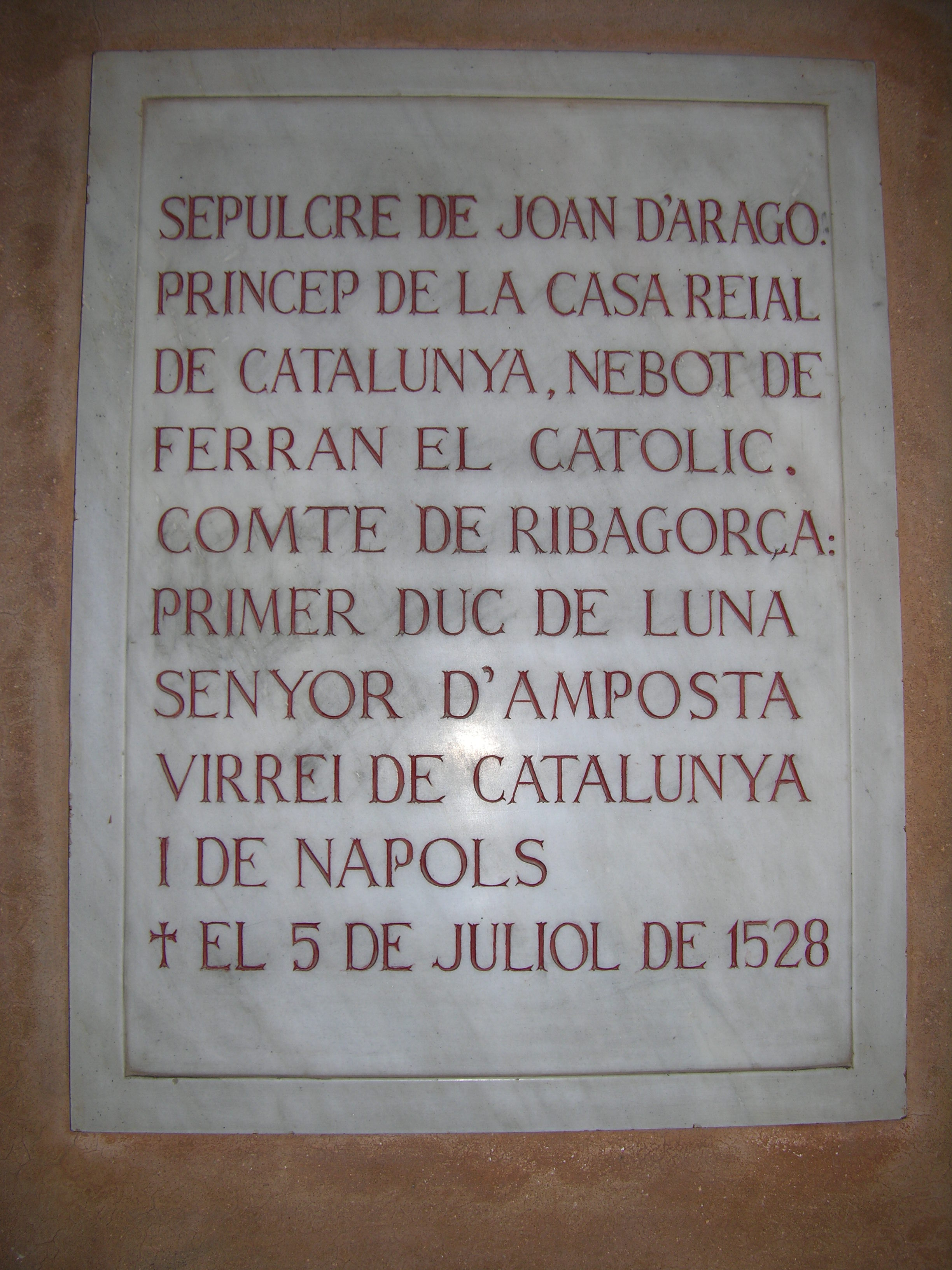 Detall del sepulcre de Joan II d'Aragó o Joan II de Ribagorça a Monserrat